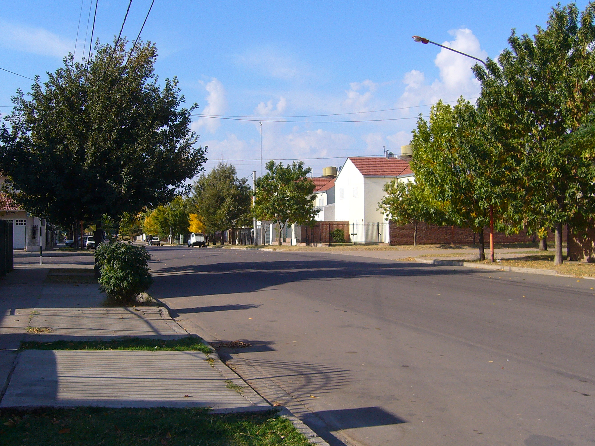 Intersección de calles periféricas en Barrio Empleados de Comercio -General Pico, La Pampa, Argentina